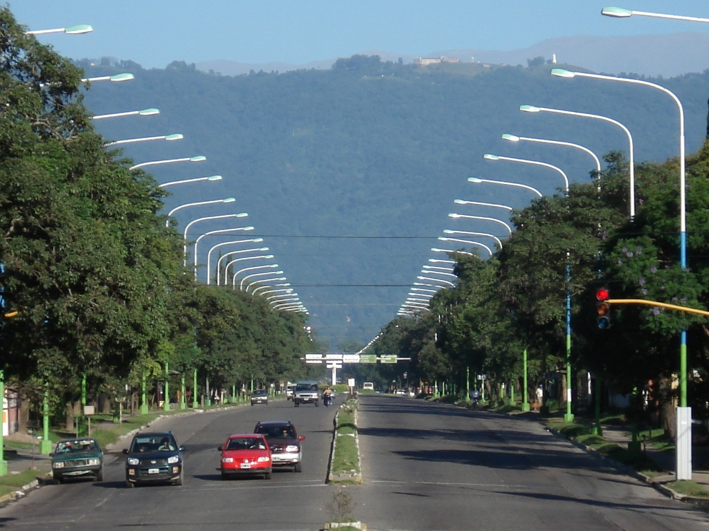 Avenida Mate de Luna, San Miguel de Tucumán